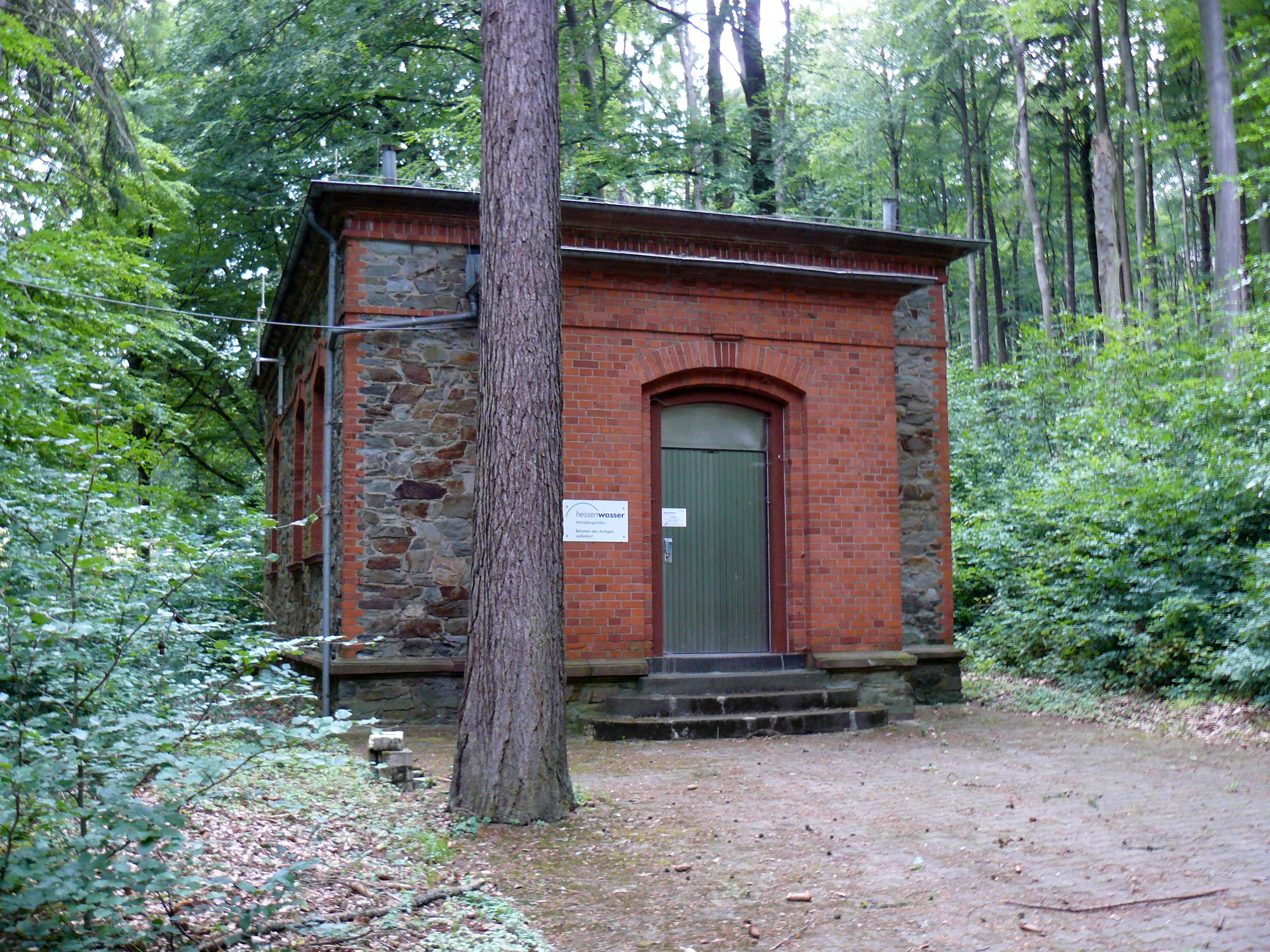 Münzbergstollen Architekt: Ernst Winter 1875-88 errichteter ältester Wiesbadener Tiefstollen